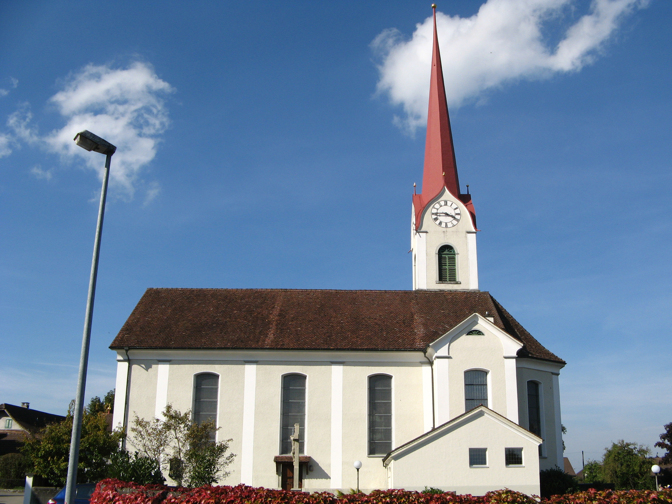 Pfarrkirche St. Anna in Mühlau, Aussenansicht